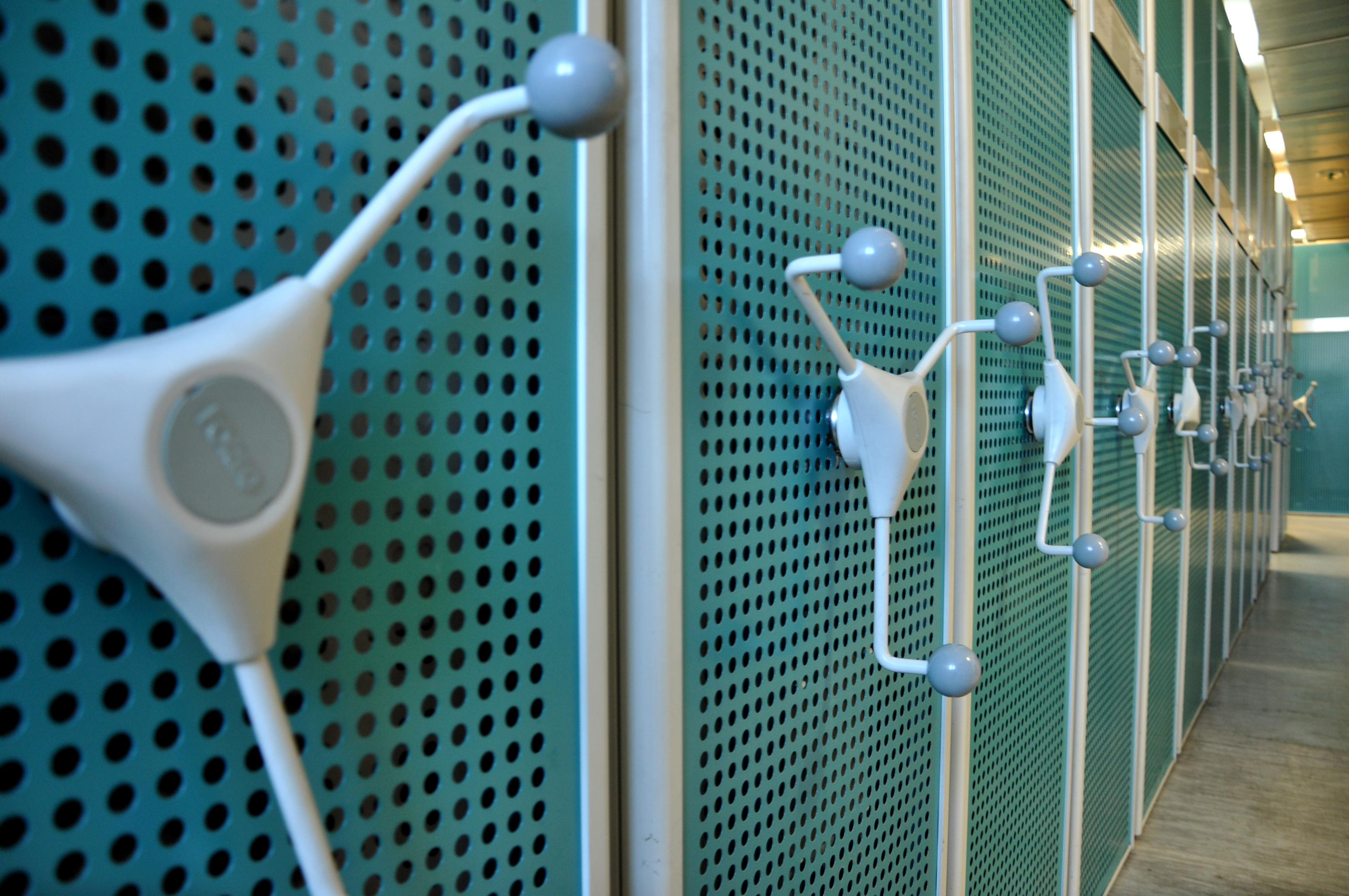 Biblioteka Śląska, magazyn kompaktowy